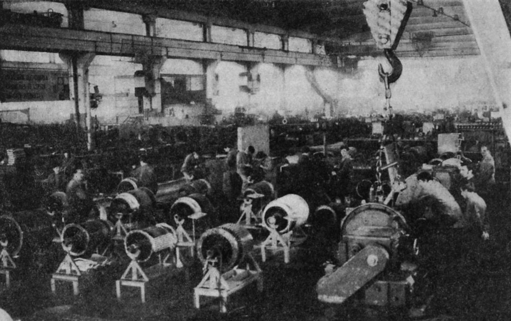 Naprawa silników elektrycznych w Zakładach Naprawczych Taboru Kolejowego w Mińsku Mazowieckim.